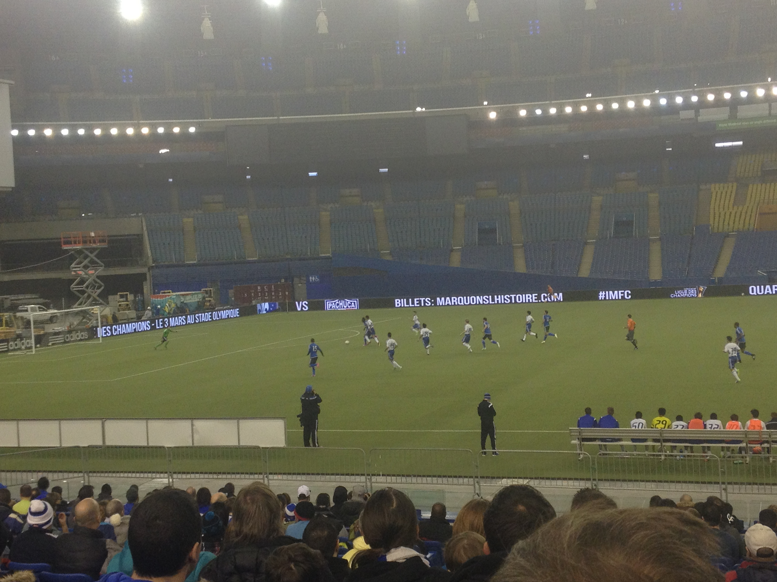 Photographie de la première pratique publique de l'Impact de Montréal au Stade olympique le 31 janvier 2015.